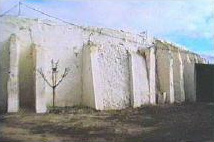 Plaza de toros de Madridejos